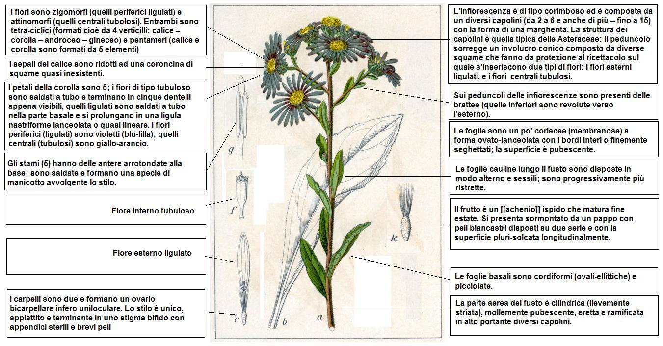 Aster amellus Sturm DESC